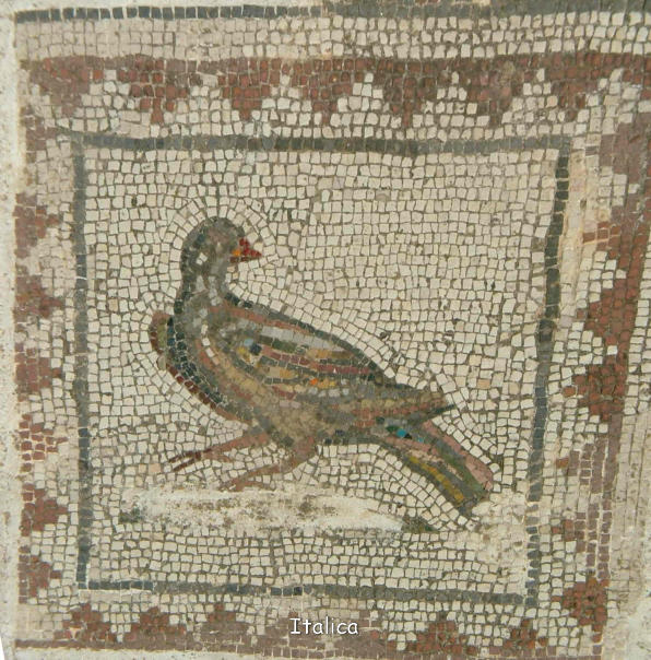 Itálica - Mosaik